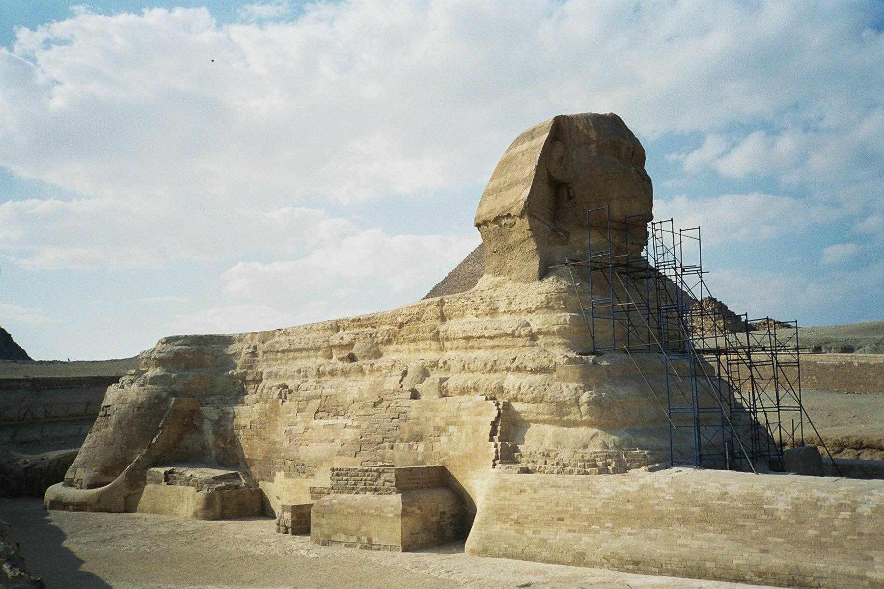 Sphinx in de steigers